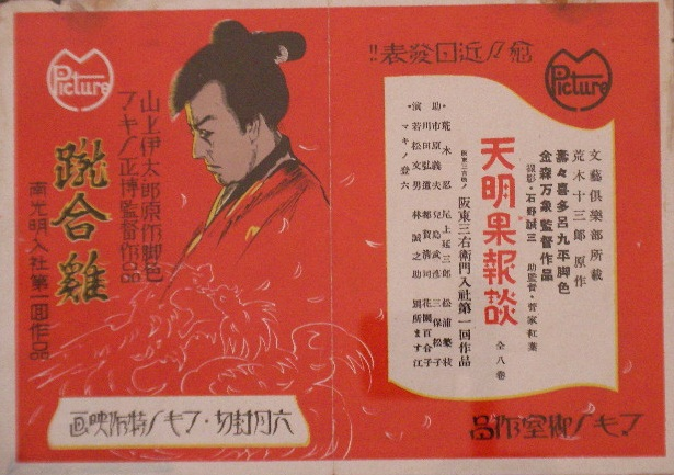 『蹴合鶏』『天明果報談』、1928年公開時のフライヤー